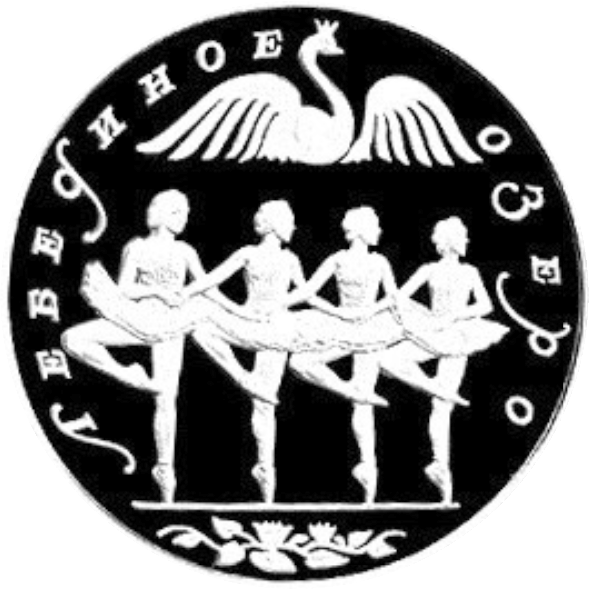 Монета Лебедине озеро. Танок маленьких лебедів